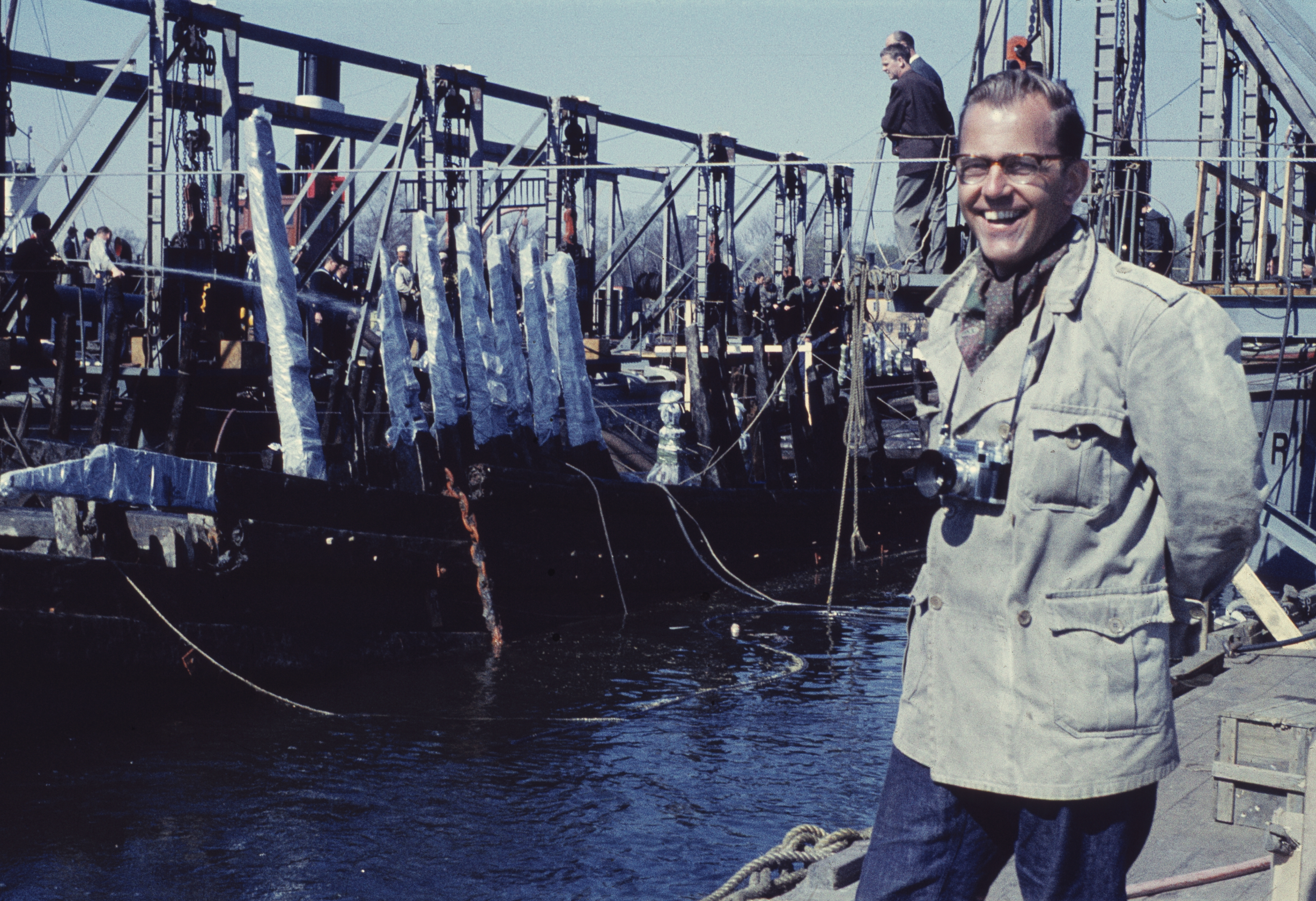 Anders Franzén, upptäckare av Vasa